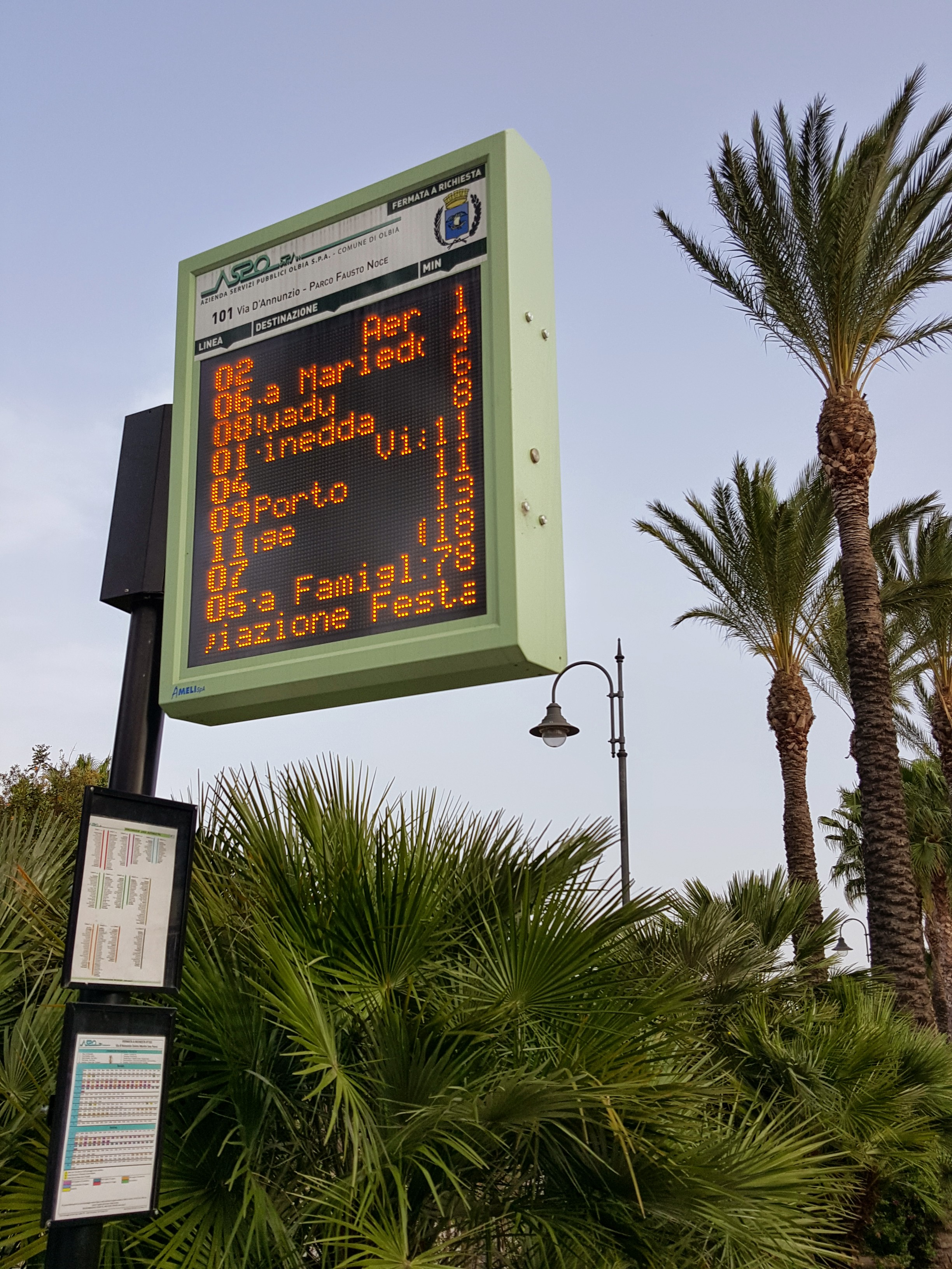 Le Paline elettroniche